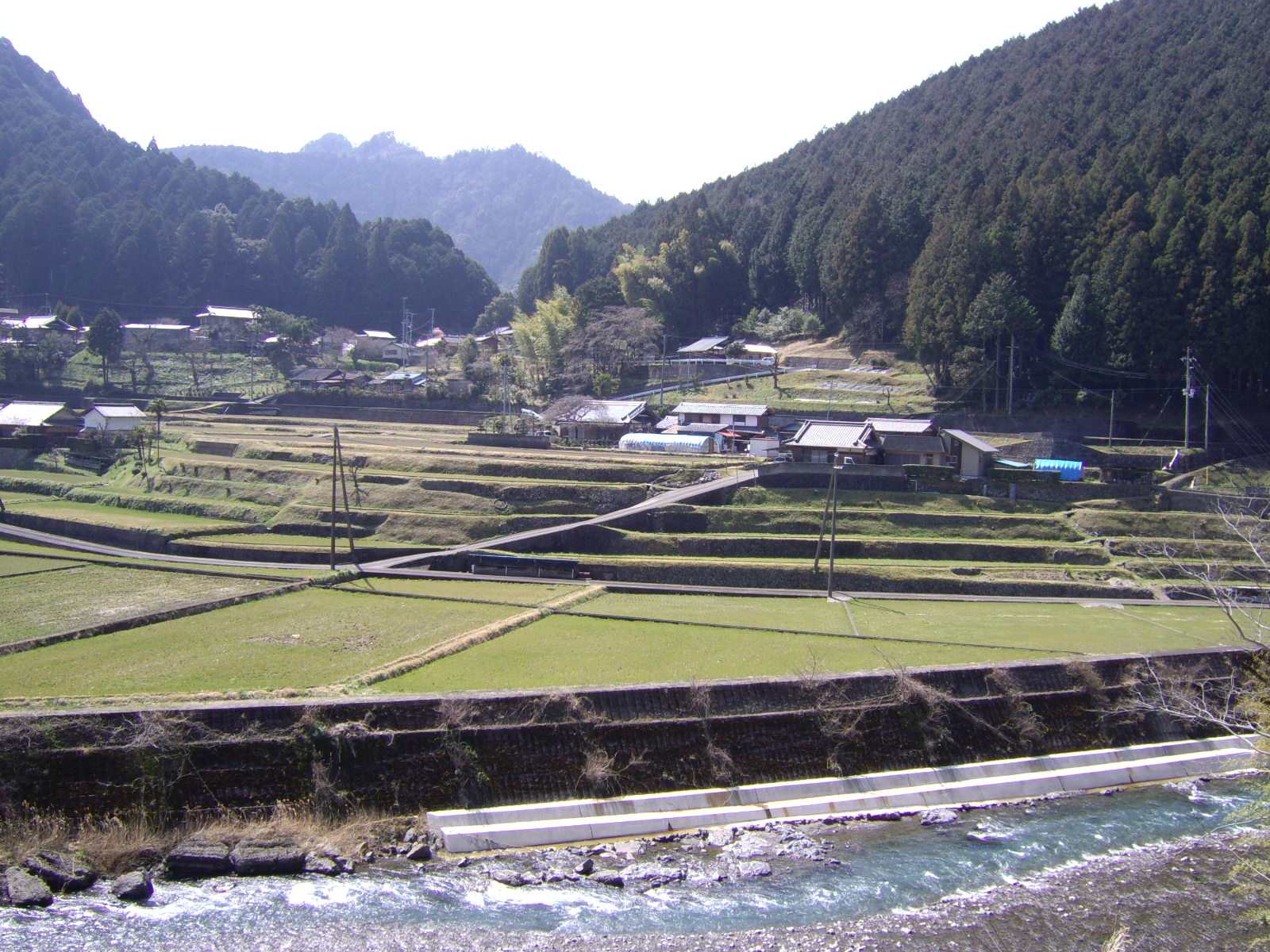 重要文化的景観「蘭島および三田・清水の農山村景観」－清水地区西原（東側）の棚田